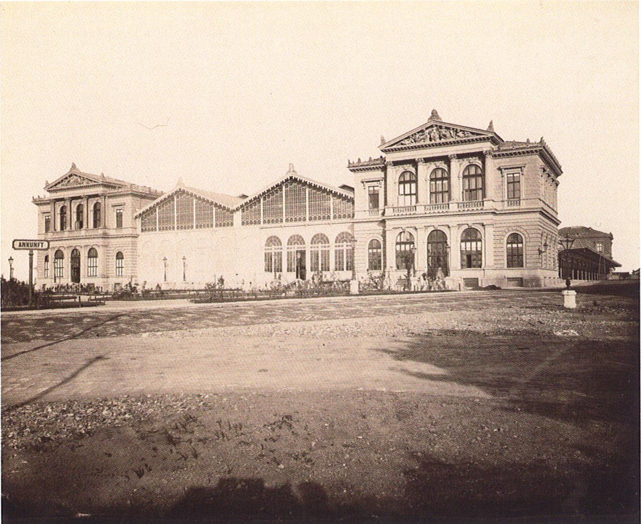 Zweiter Ostbahnhof (Staatsbahnhof), Ansicht gegen den Bahnhofsplatz.